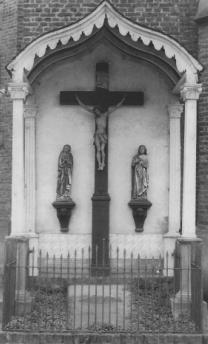 Missionskreuz in Nörvenich